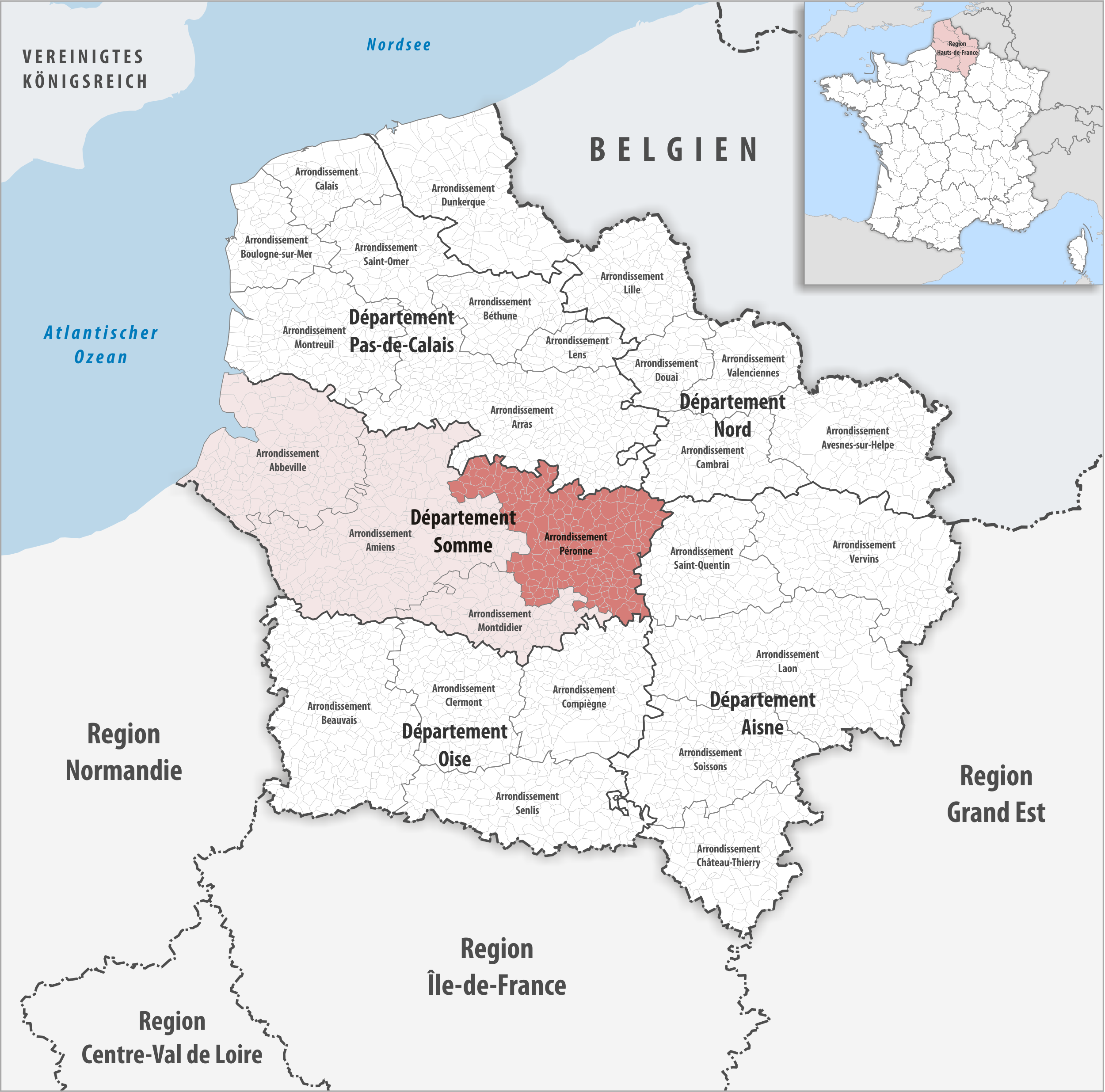 Lage des Arrondissements Péronne